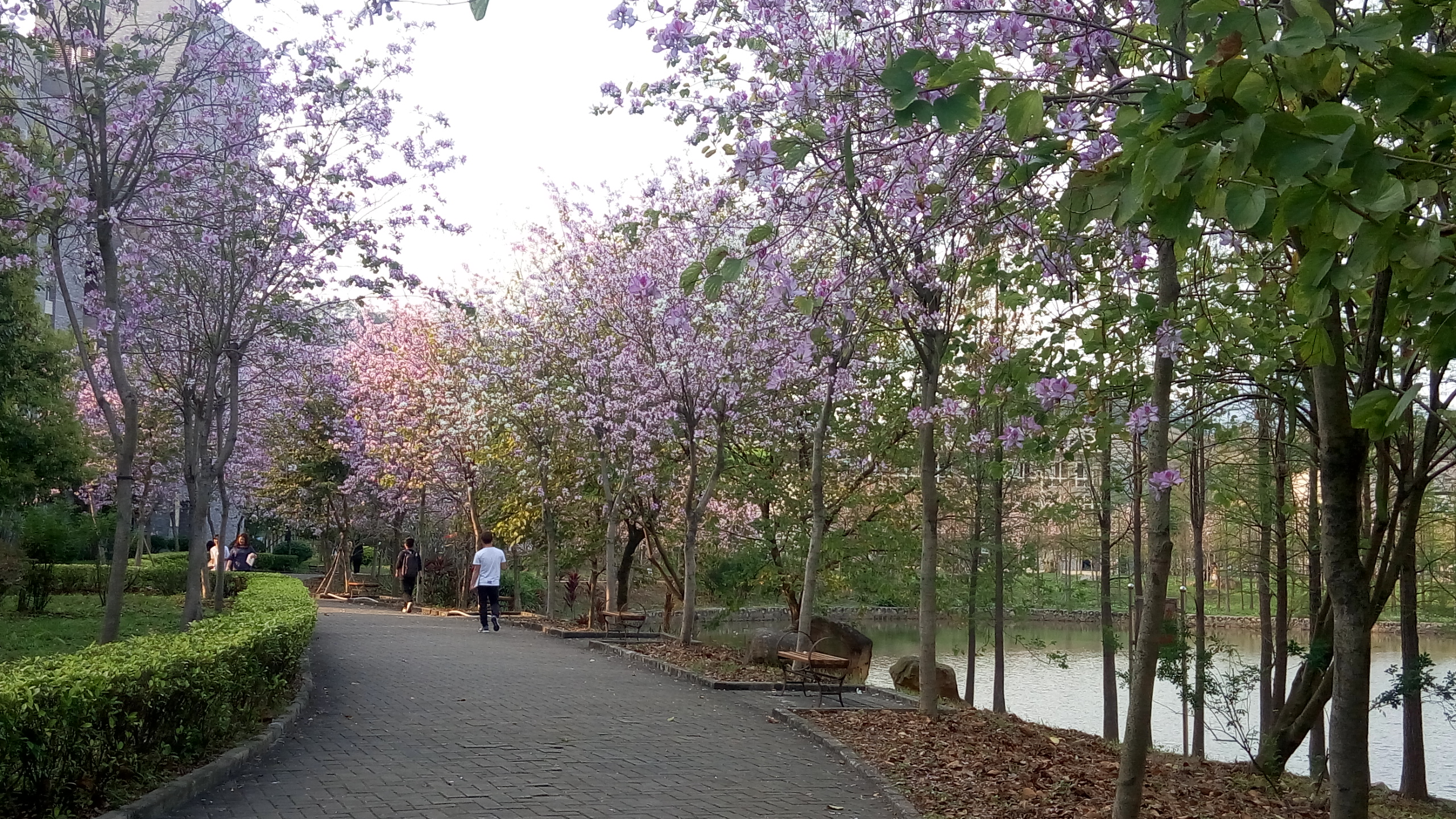 中文（中国大陆）: 洋紫荆开花